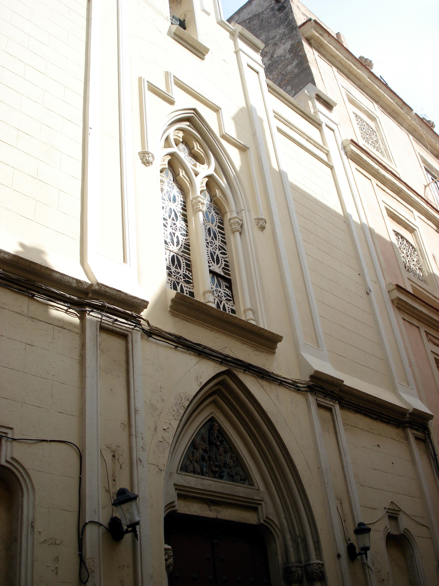 Church of Diego José de Cádiz.